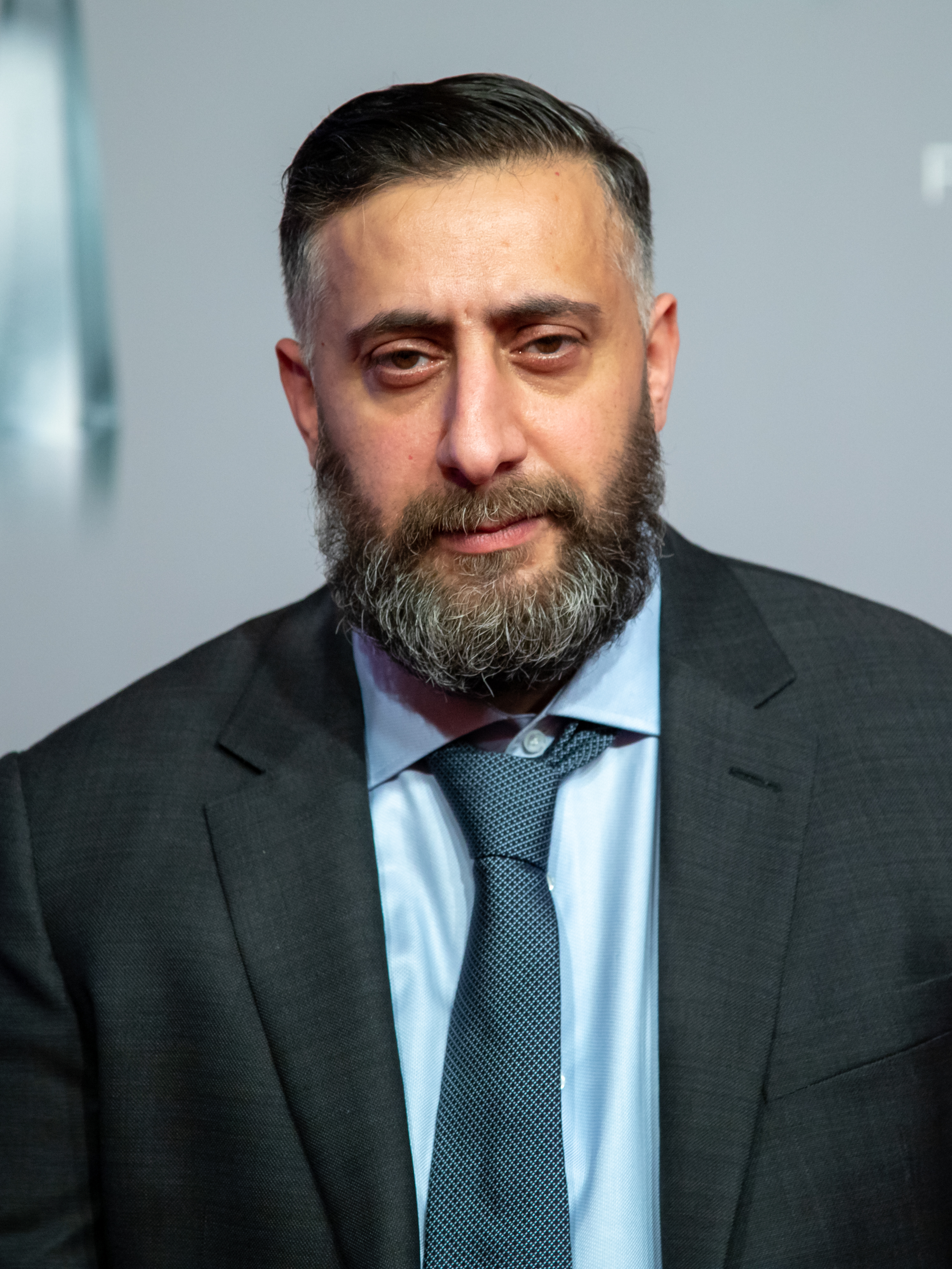 Kida Khodr Ramadan beim Deutschen Fernsehpreis 2019 in der Düsseldorfer Rheinterrasse